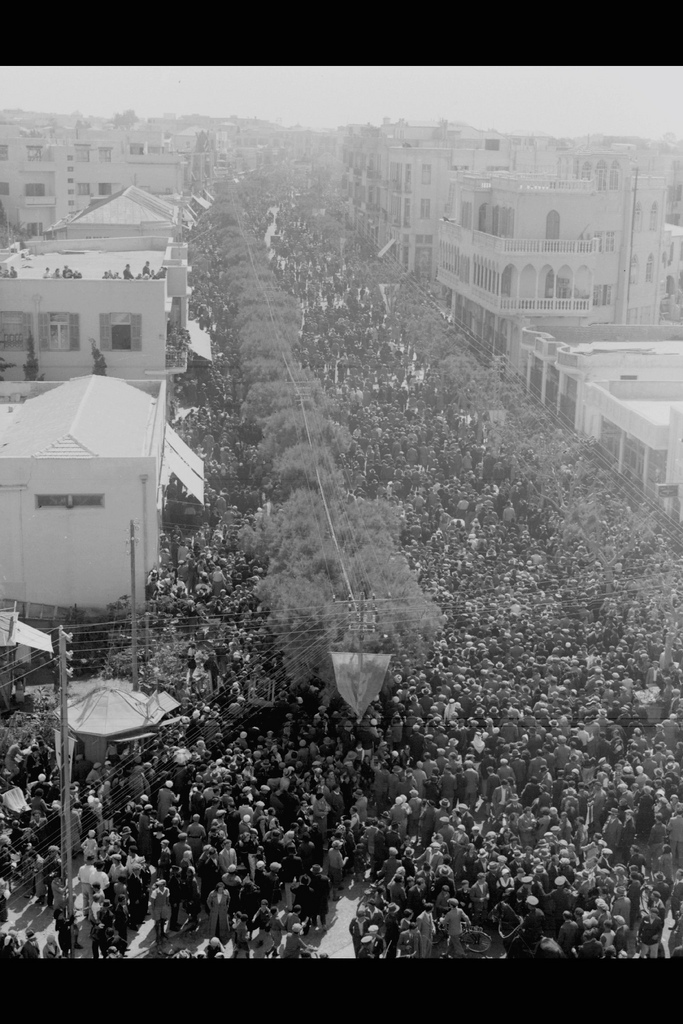 רבבות איש ברחובות תל אביב במהלך תהלוכות העדלאידע